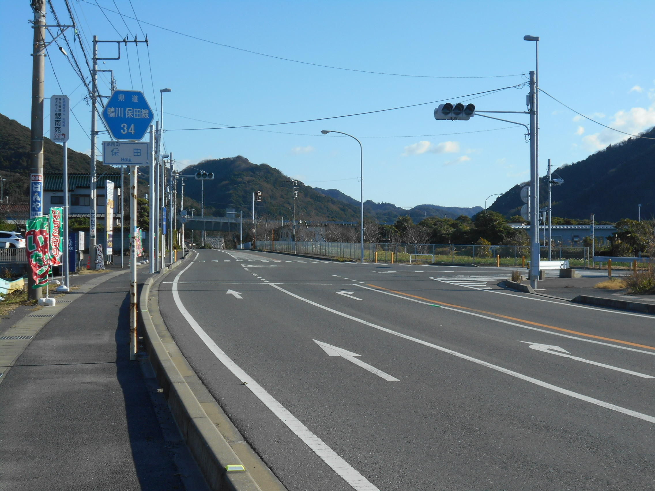 千葉県道34号鴨川保田線 安房郡鋸南町保田 鋸南保田インターチェンジ付近 道の駅保田小学校付近